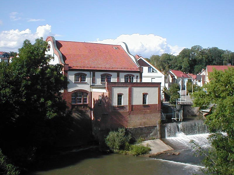 Elektrizitätswerk in Meckesheim, aus einer 1719 erstmals erbauten Mühle im Jahr 1908 im Stil des Jugendstils umgebaut